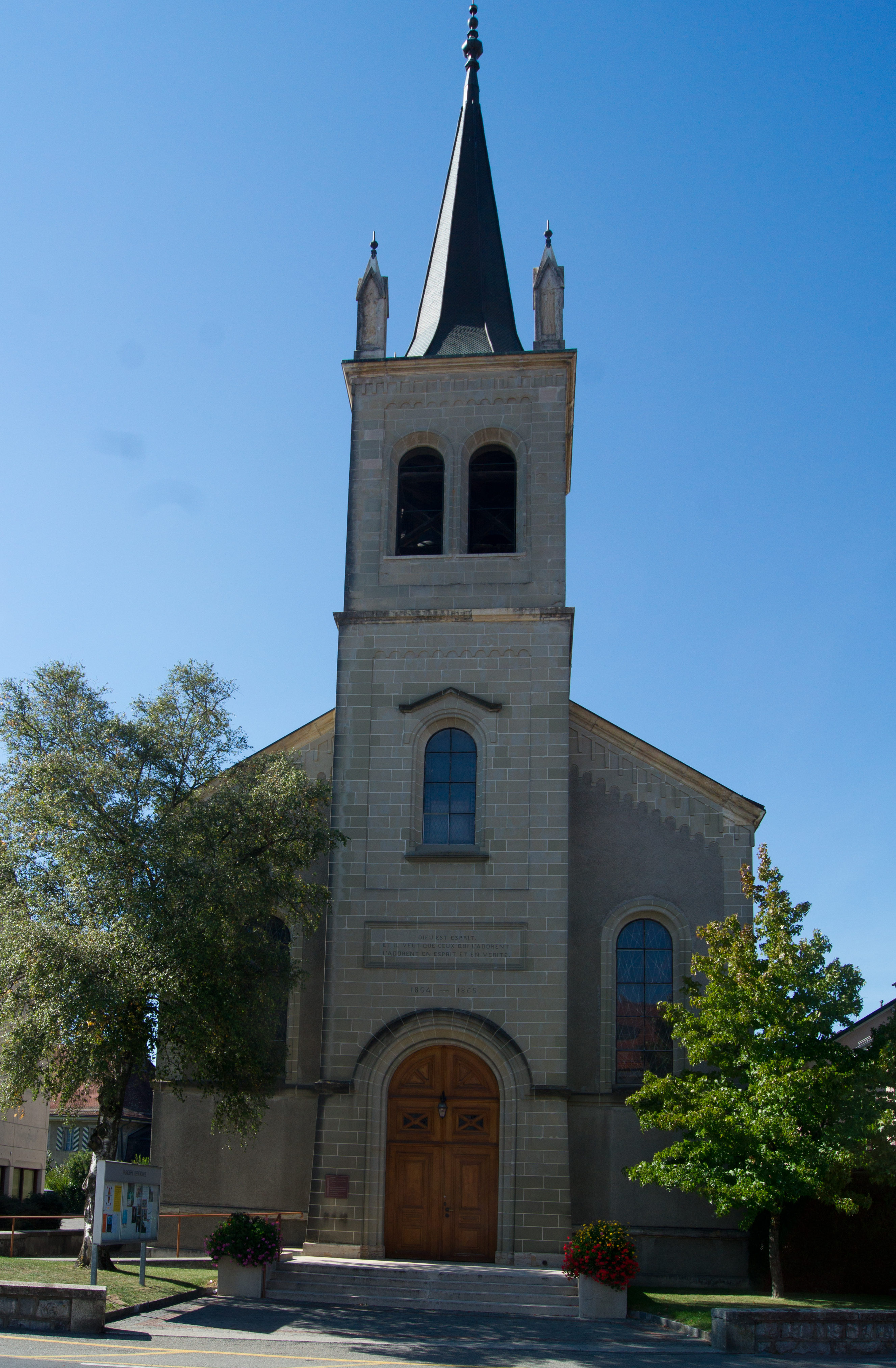 Temple d'Echallens, canton de Vaud, Suisse.